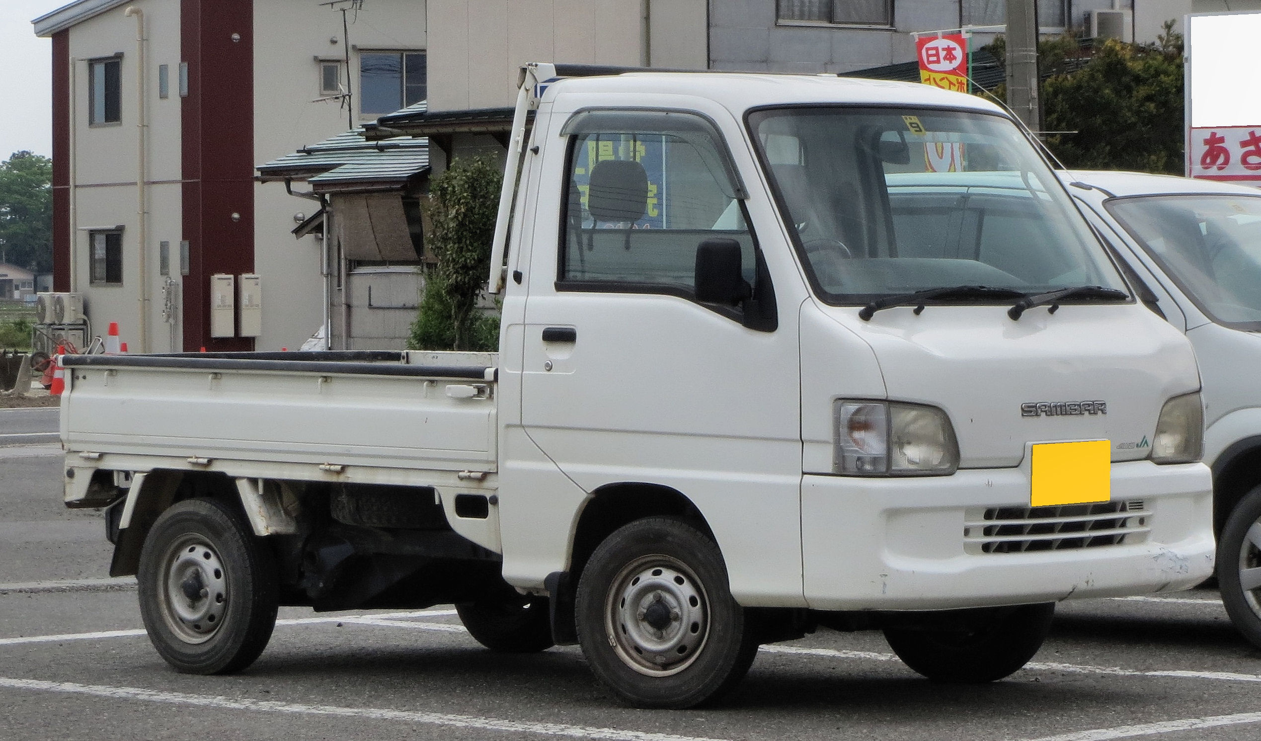 スバル JAサンバートラック 前期型